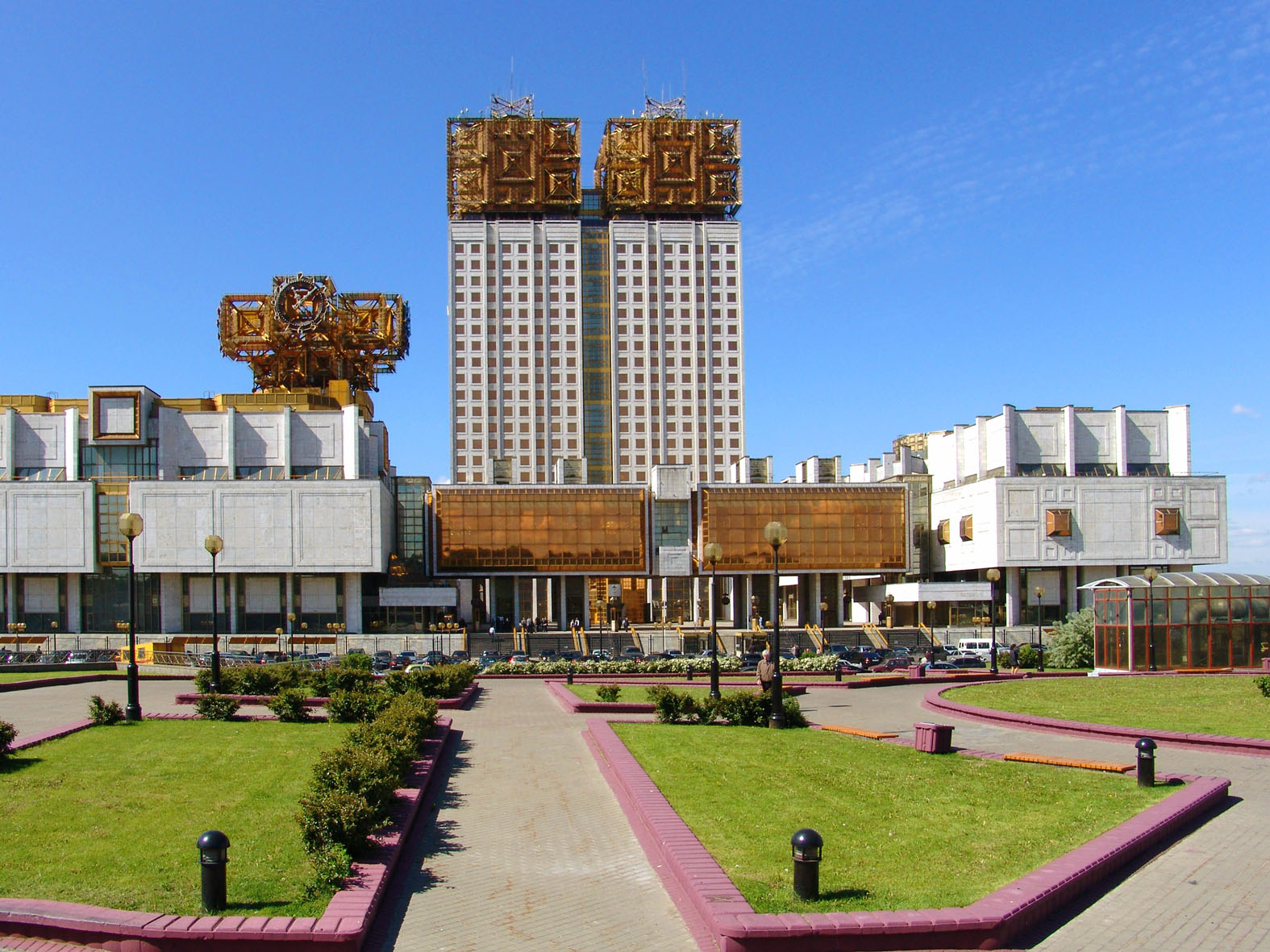 Президиум Российской академии наук. Москва, Ленинский проспект, дом 32а.